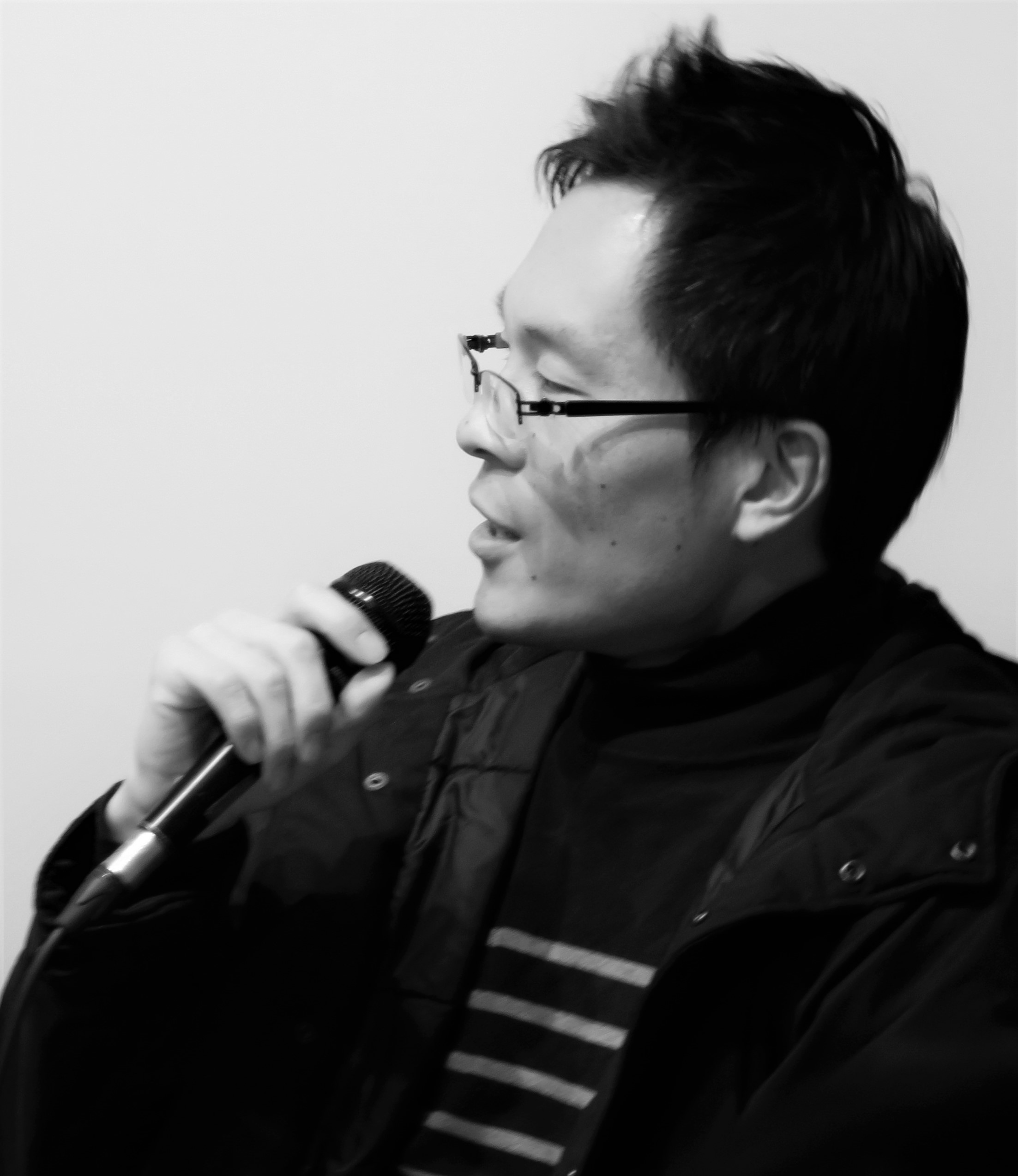 真鍋厚氏イベントにて。